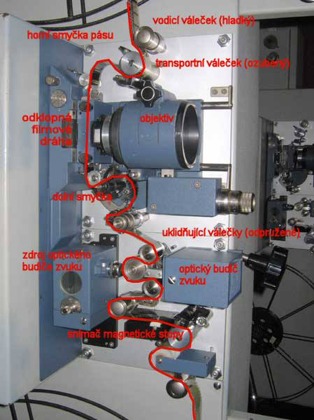 Nákres dráhy filmu a popisky hlavních částí projektoru